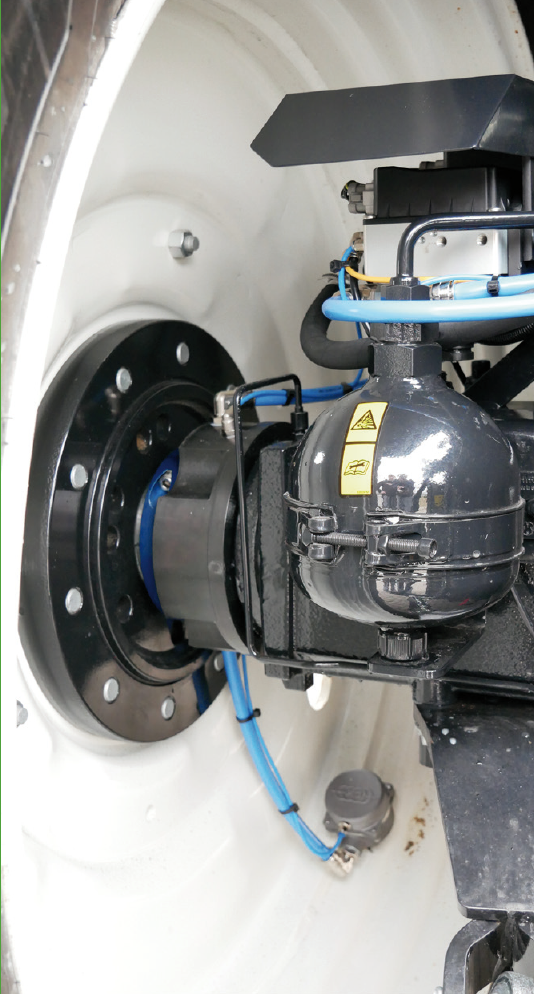 Joint tournant radial pour télégonflage agricole